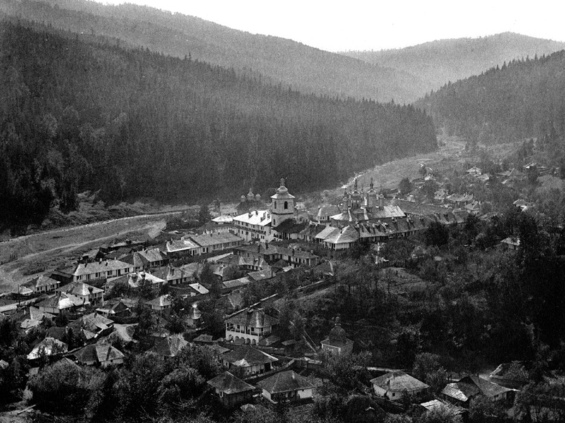 Agapia Monastery